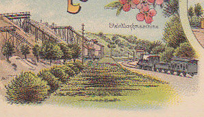 Ausschnitt einer historische Postkarte des Malers J. Steidel aus Daisbach. Sie zeigt verschiedene Ansichten der Gemeinde Eschelbronn